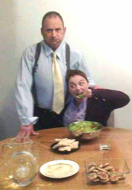 רפי אדיר בסרטה של טל בנצ'יק "היית מת"